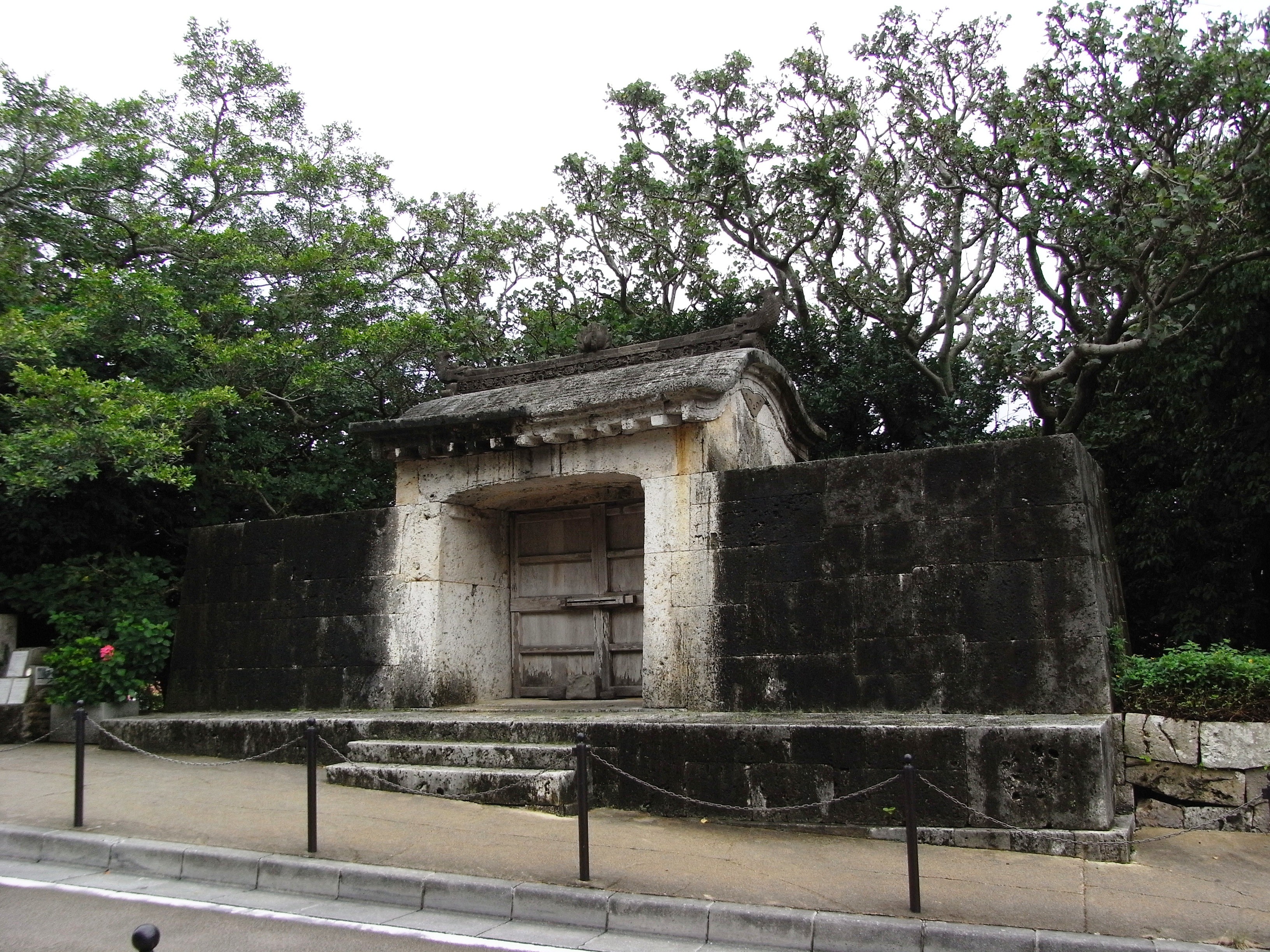 首里城 園比屋武御嶽石門